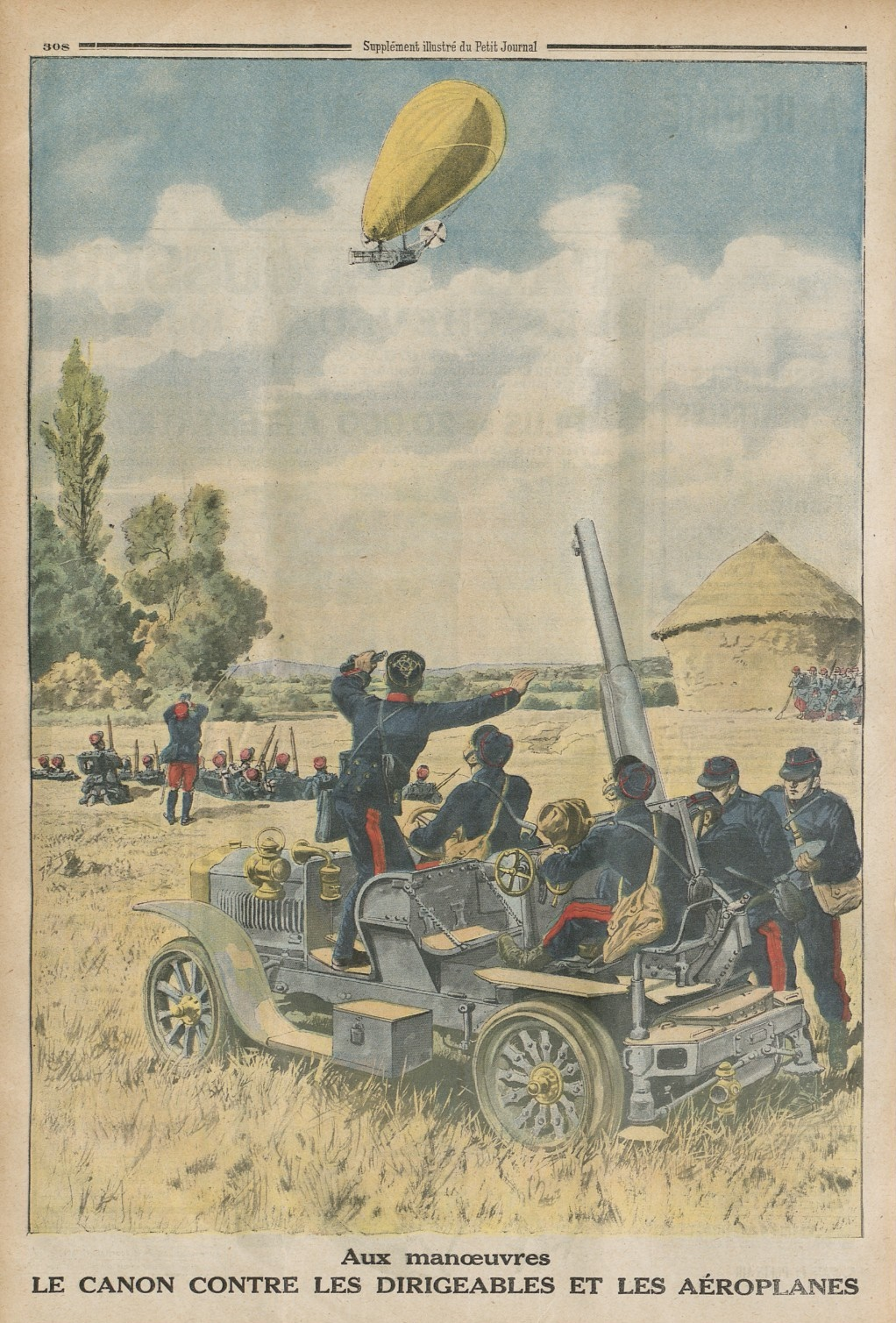 Le prototype de l'autocanon De Dion-Bouton testé contre un dirigeable lors des grandes manœuvres. Illustration publiée dans le supplément du dimanche du Petit Journal, numéro 1192 paru le 21 septembre 1913.